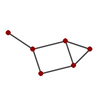 Exemple de graf planar